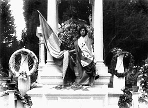 Scène extraite du film "El drama del 15 de octubre" sorti en 1915.